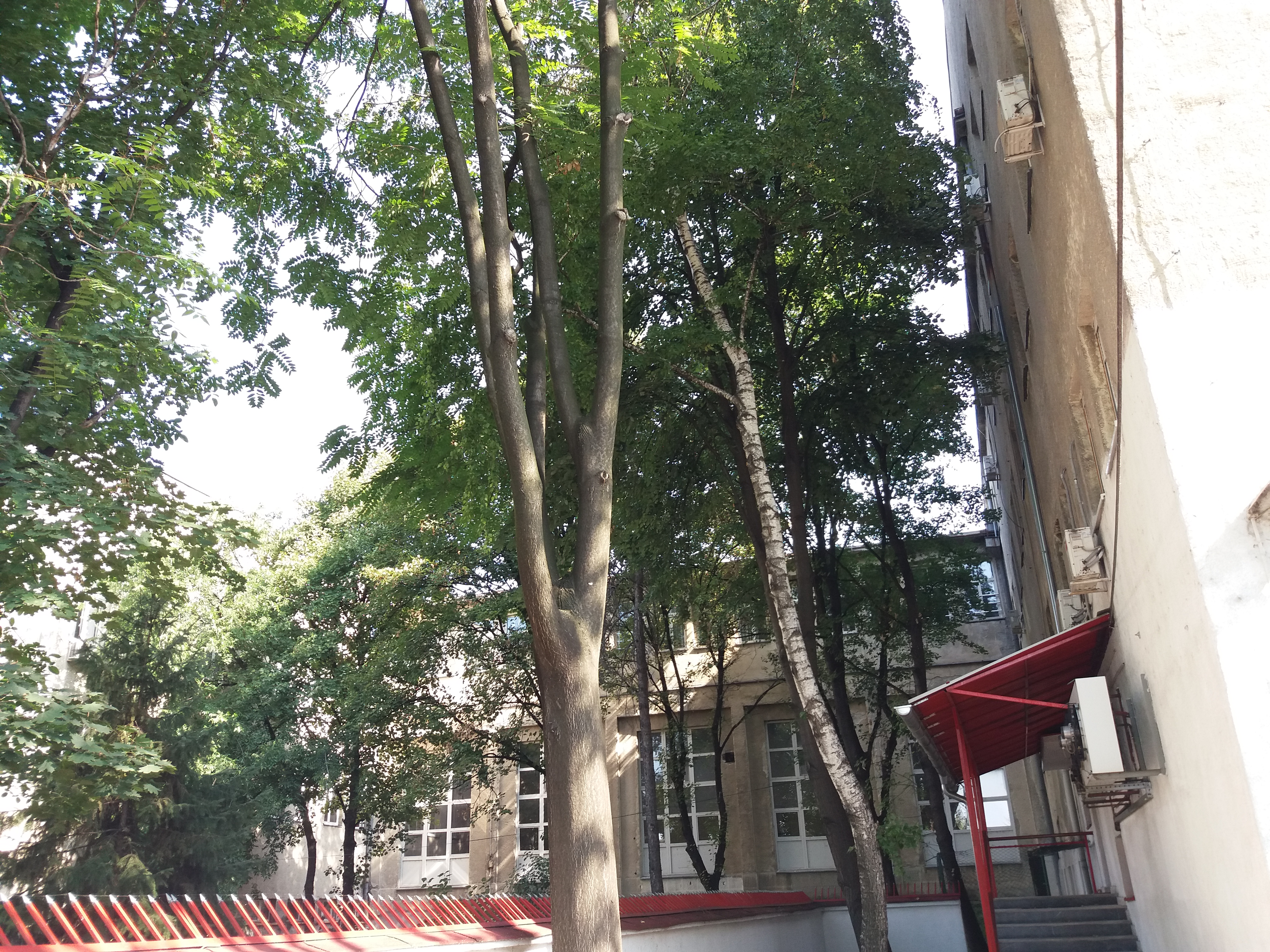 Srpski (latinica): Medicinska škola Nadežda Petrović, Zemun